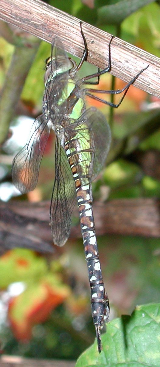 Aeshan mixta, female, lateral view. Kirchwerder, Elbmarsch bei Hamburg, Germany